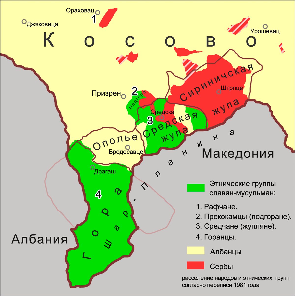 Этнические группы славян мусульманского вероисповедания в юго-западном Косове с родными южнославянскими диалектами. Источники: Младеновић Р. Шар Планина и њене жупе у косовско–метохијској области Јужне Србије // Горанци, Муслимани и Турци у шарпланинским жупама Србије: проблеми садашњих услова живота и опстанка: зборник радова са «Округлог стола» одржаног 19 априла 2000 године у Српској академији наука и уметности / (организатори) Српска академија наука и уметности, Одбор за проучавање Косова и Метохије (и) Географски институт «Јован Цвијић» / Милан Бурсаћ. — Београд: Географски институт «Јован Цвијић» САНУ, 2000. — P. 9. Младеновић Р. Горански говор // Горанци, Муслимани и Турци у шарпланинским жупама Србије: проблеми садашњих услова живота и опстанка: зборник радова са «Округлог стола» одржаног 19 априла 2000 године у Српској академији наука и уметности / (организатори) Српска академија наука и уметности, Одбор за проучавање Косова и Метохије (и) Географски институт «Јован Цвијић» / Милан Бурсаћ. — Београд: Географски институт «Јован Цвијић» САНУ, 2000. — P. 52. Младенович Р. Говоры трех мусульманских славянских этнокультурных групп на юго-западе Косово и Метохии (Языки и диалекты малых этнических групп на Балканах: Тезисы докладов на Международной научной конференции). С. 27—28. СПб.: Институт лингвистических исследований РАН (2004). Ethnic composition of Kosovo 1981.png: Sergey Kondrashov (author)